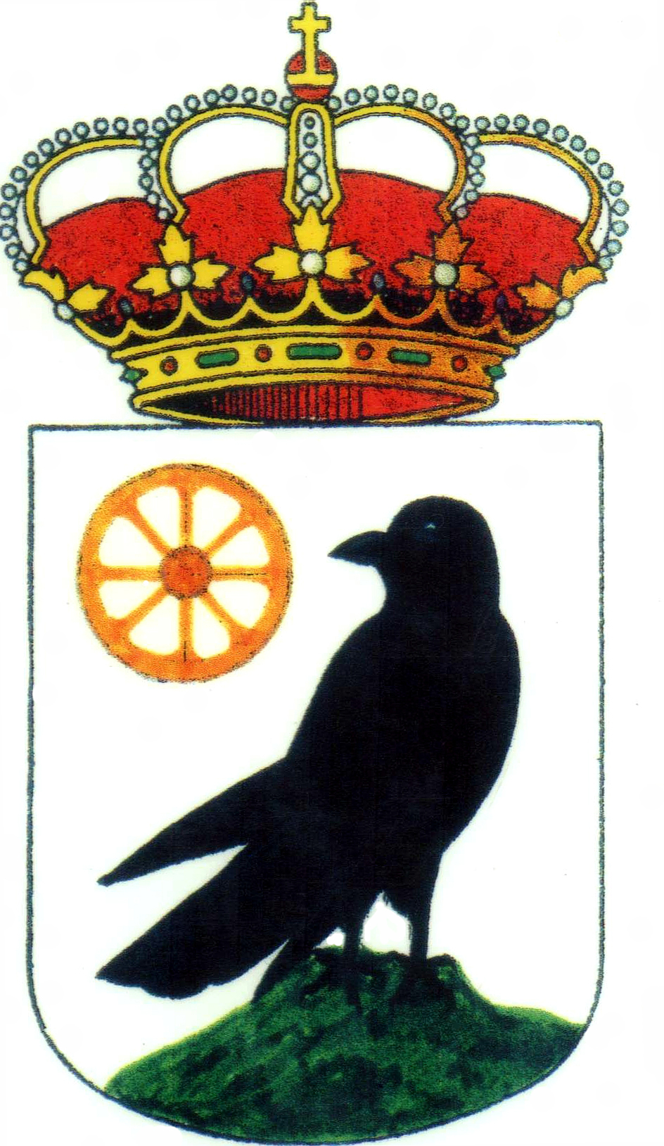 Escudo de El Cuervo de Sevilla